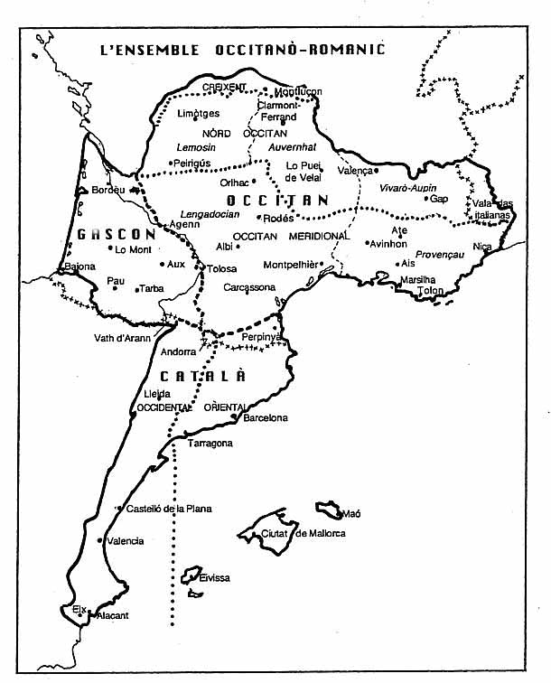 Mapa de l'espaci arromanic - occitan